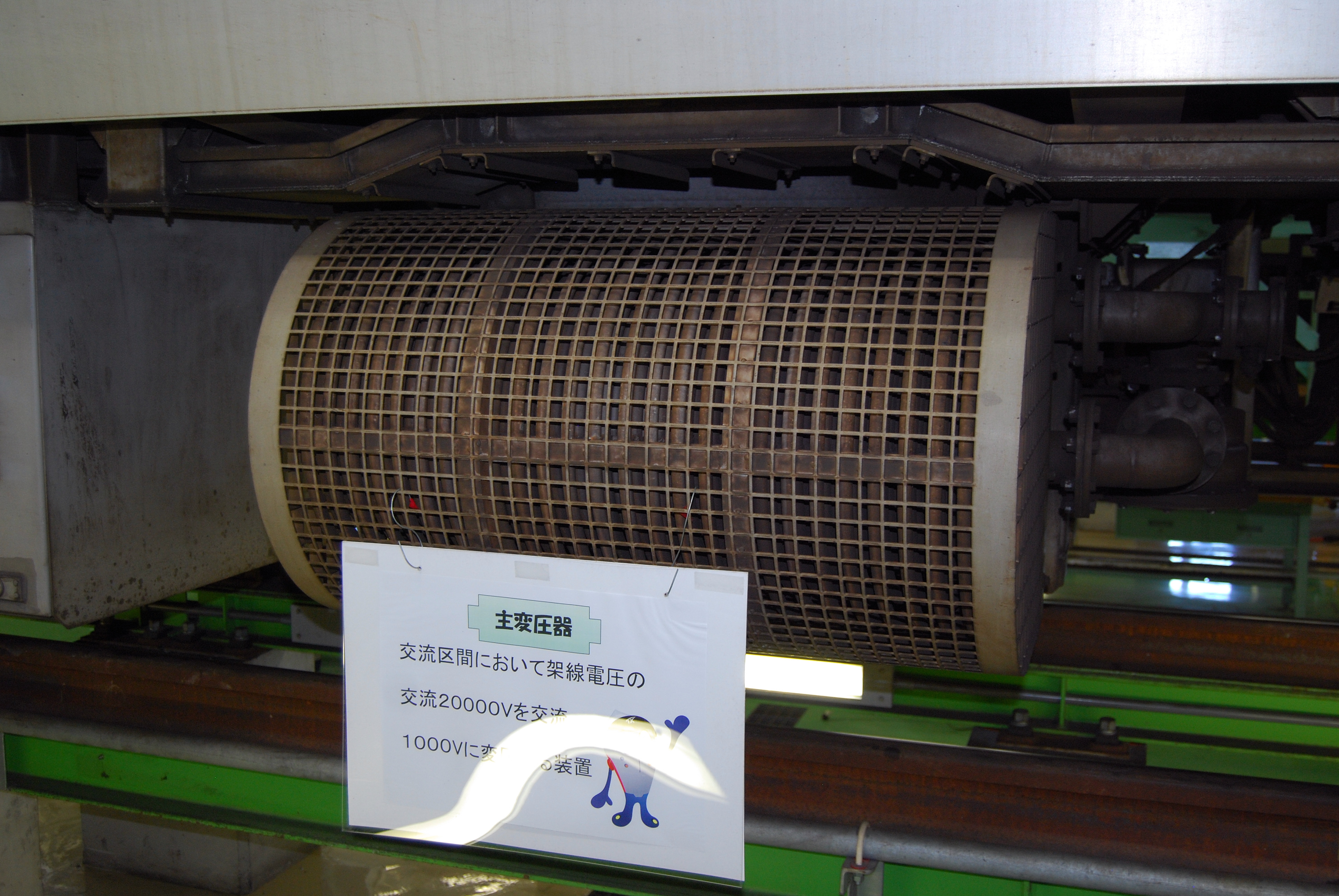 首都圏新都市鉄道TX-2000系の床下にある主変圧器、交流区間で架線からの交流20KVを交流1000Vまで降圧させる装置（つくばエキスプレス祭りでの車両基地開放時に撮影）